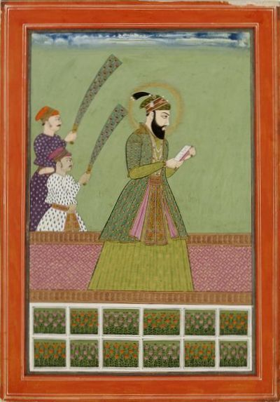 Nasir Jung, Nizam of Hyderabad